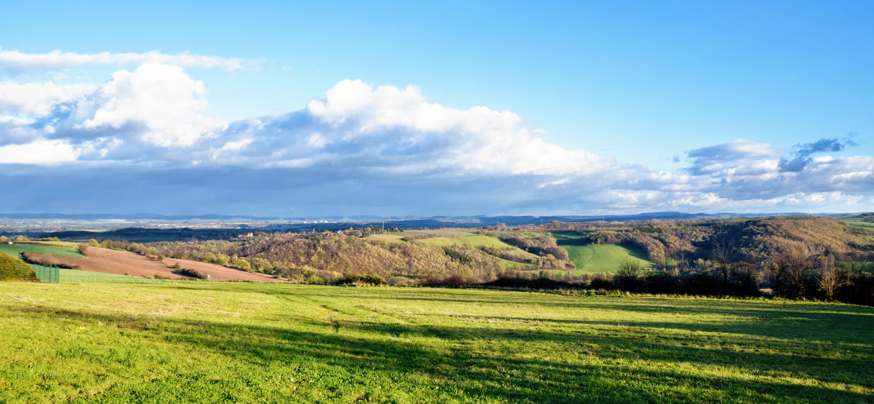 Blick von Babisnau in Richtung des Kreischaer Beckens